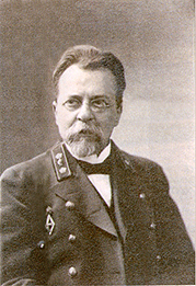 Лисовский Александр Николаевич, первый директор Уфимского учительского института